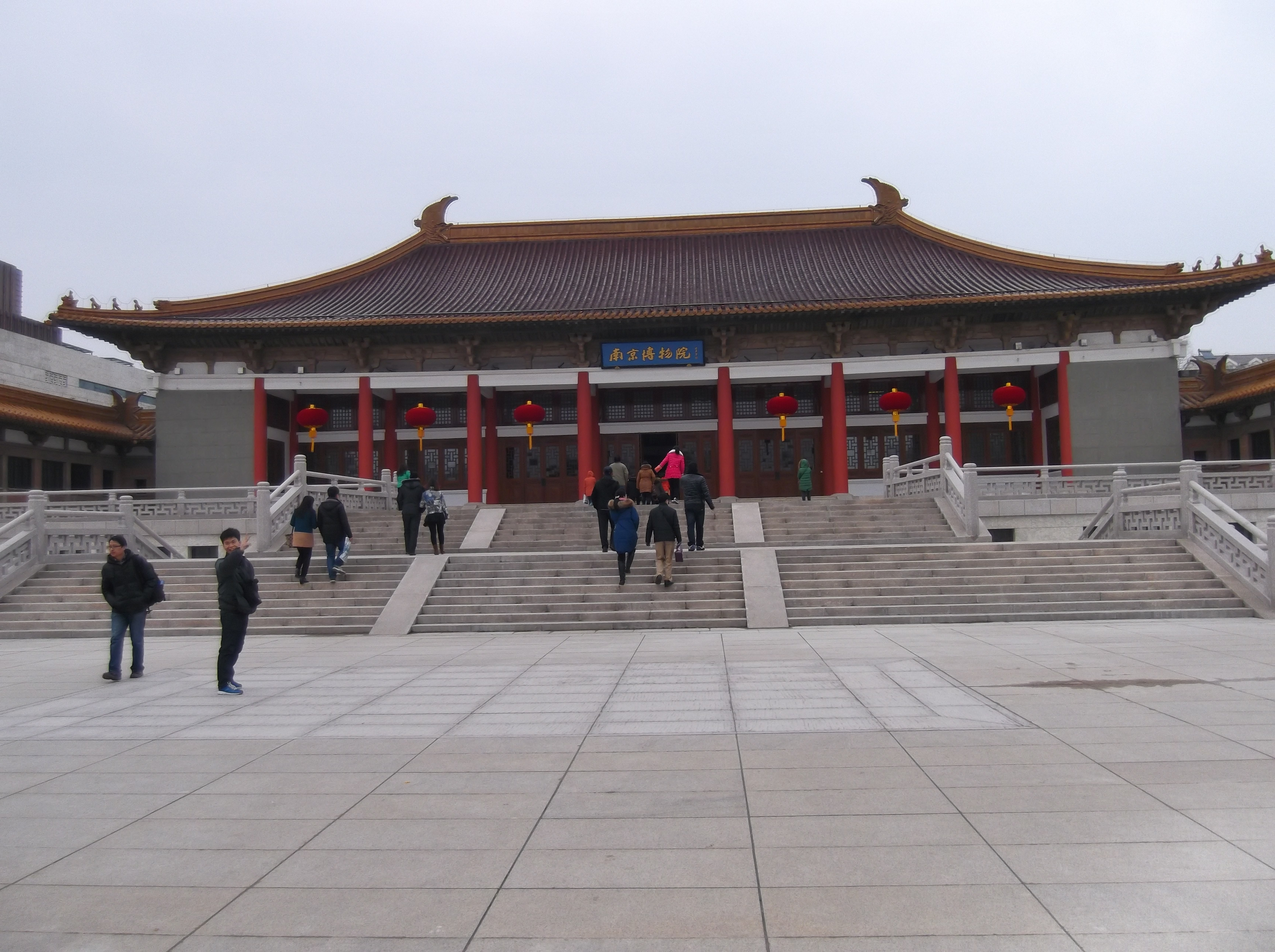 Xuanwu, Nanjing, Jiangsu, China